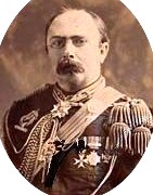 Adriaan Rudolf Willem Gey van Pittius (1838-1896)